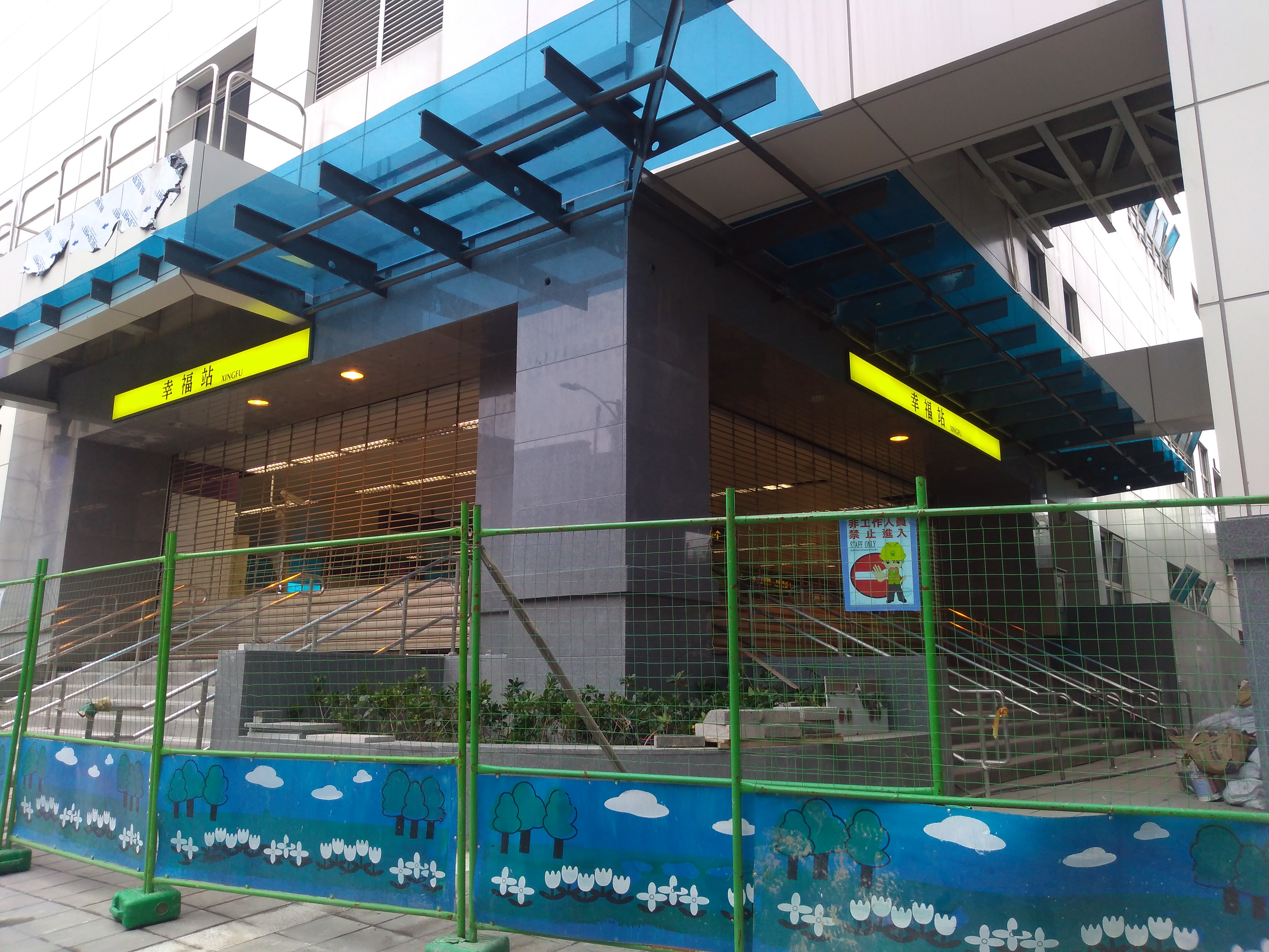 中文（台灣）: 建造中的台北捷運環狀線幸福站